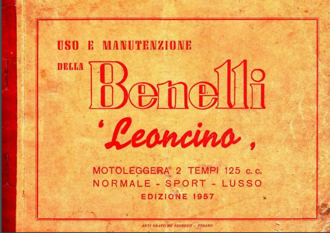 Frontespizio del libretto di uso e manutenzione di un Leoncino del 1957